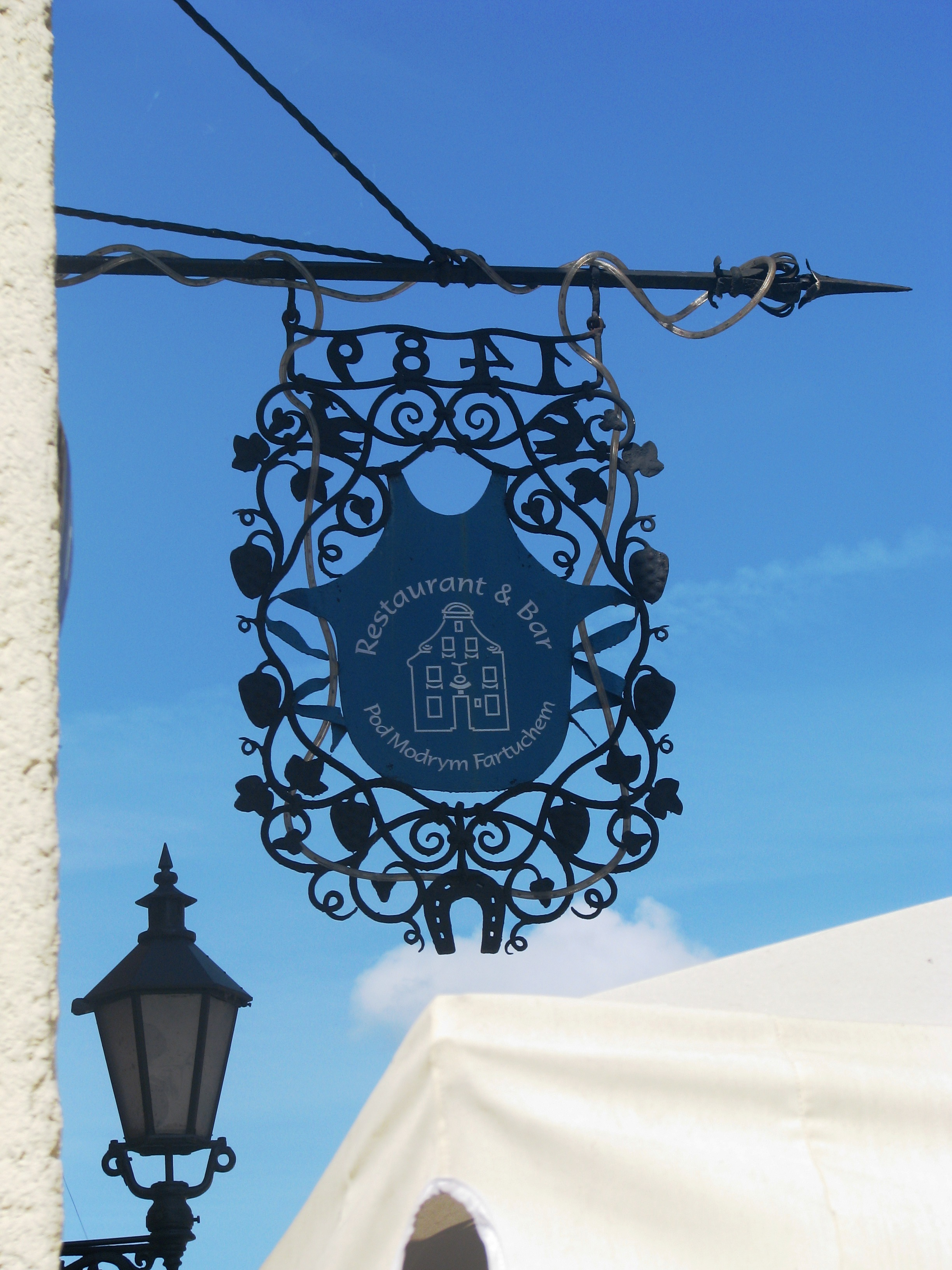 Toruń, Rynek Nowomiejski 8 - gospoda „Pod Modrym Fartuchem”, XVIII w. (zabytek nr A/171)